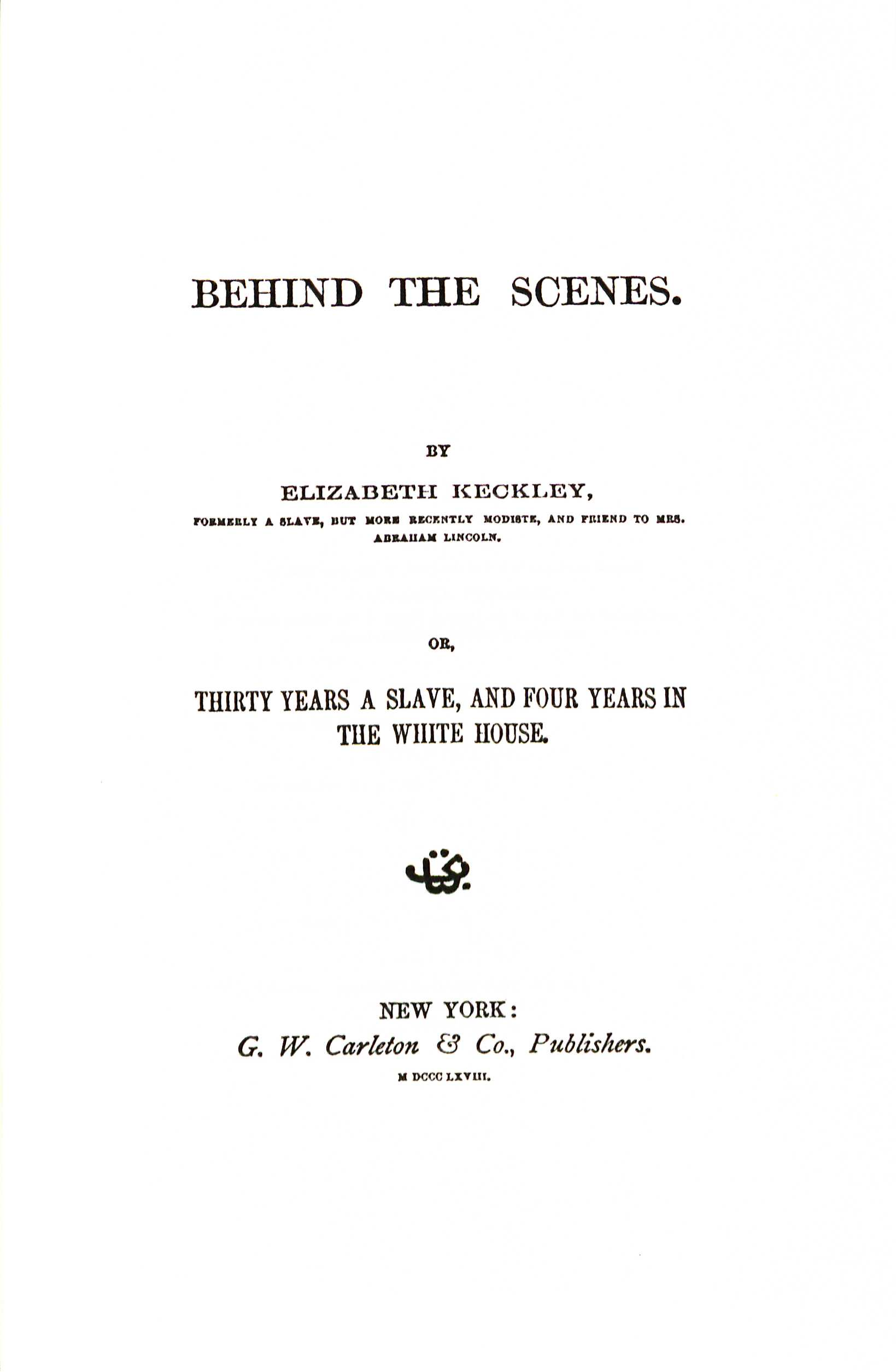 Behind the Scenes Titelseite